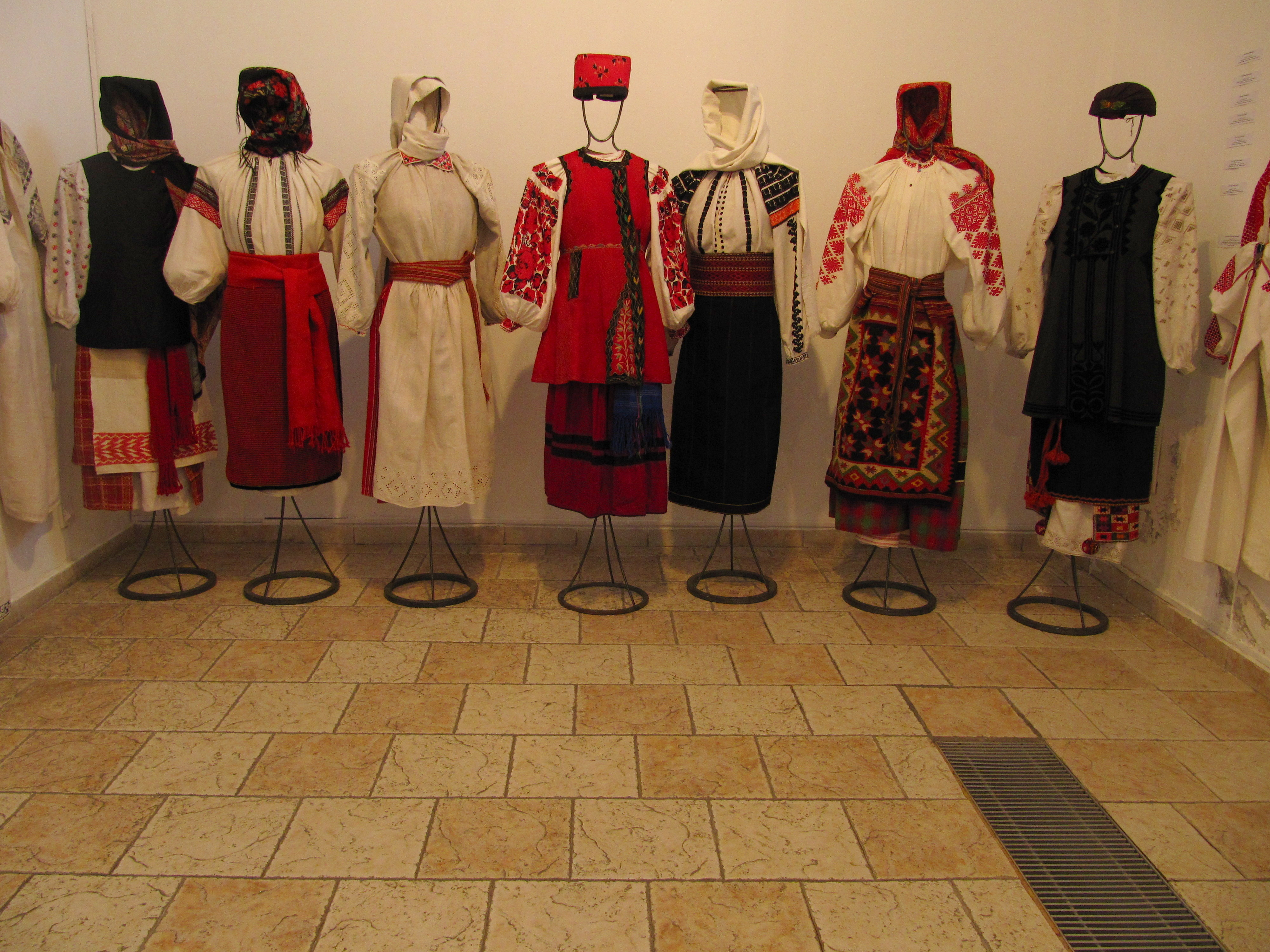 Вишита сорочка. Виставка в музеї Івана Гончара (Київ).